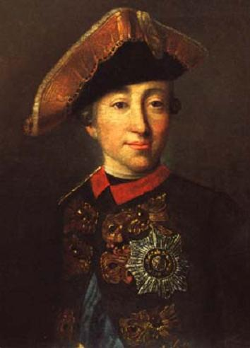 Неизвестный русский художник ПОРТРЕТ ИМПЕРАТОРА ПЕТРА III Последняя треть XVIII в.